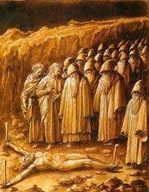 Divina Commedia, Inferno, Canto 23